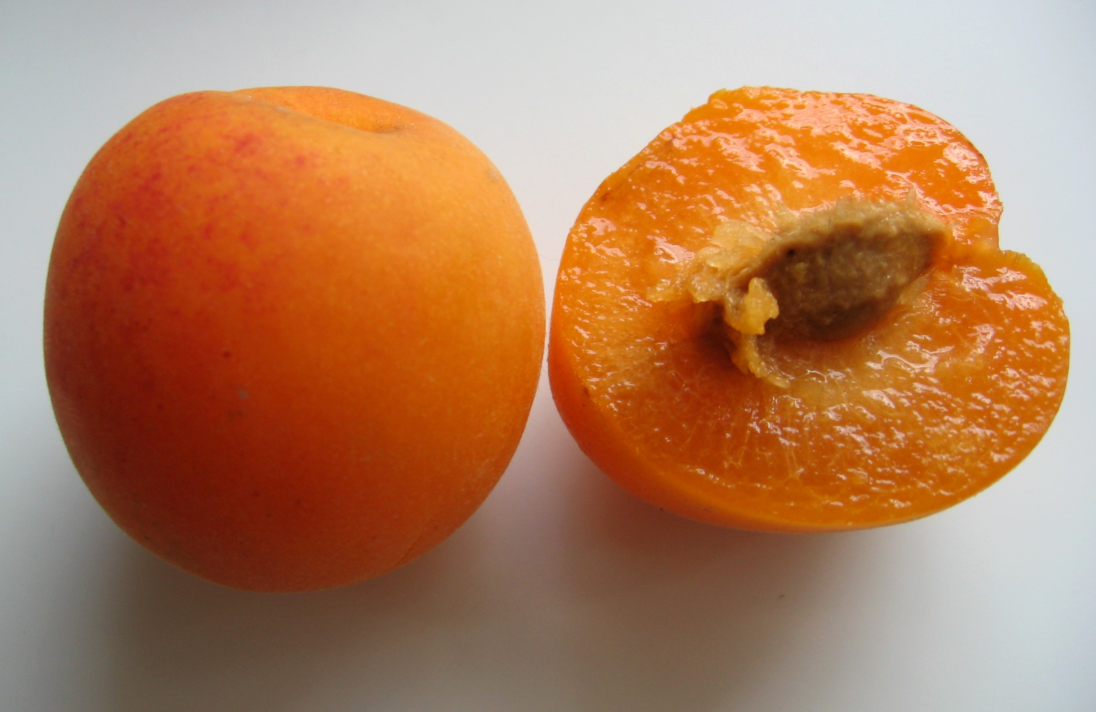 Fruit commercialisé en France et ayant poussé à Générac dans le Gard